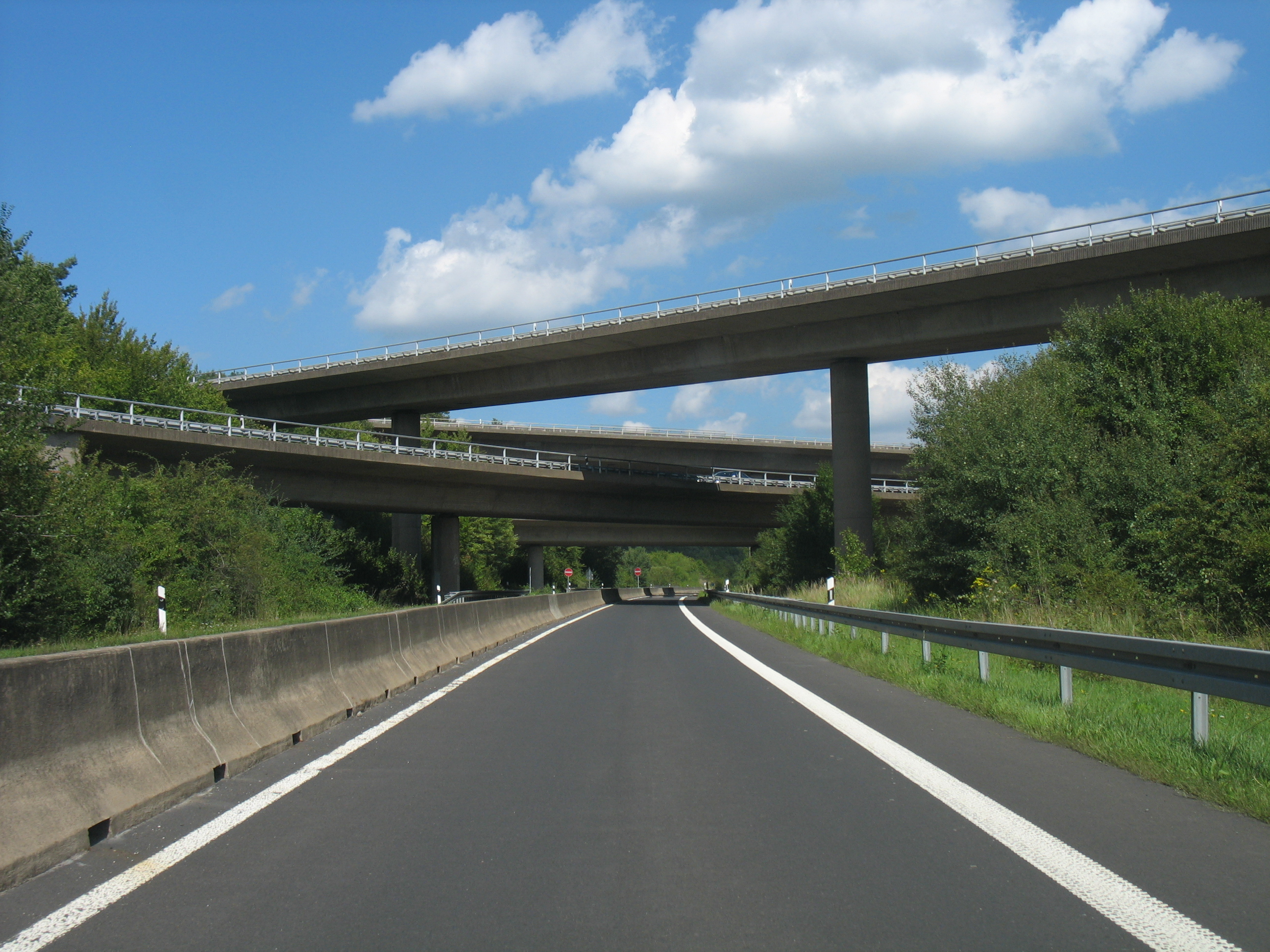 Wetzlarer Kreuz von der A 480 aus gesehen.